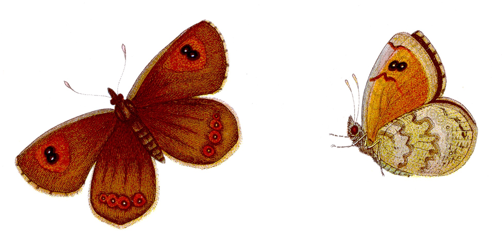 Schillernder Mohrenfalter - Erebia tyndarus